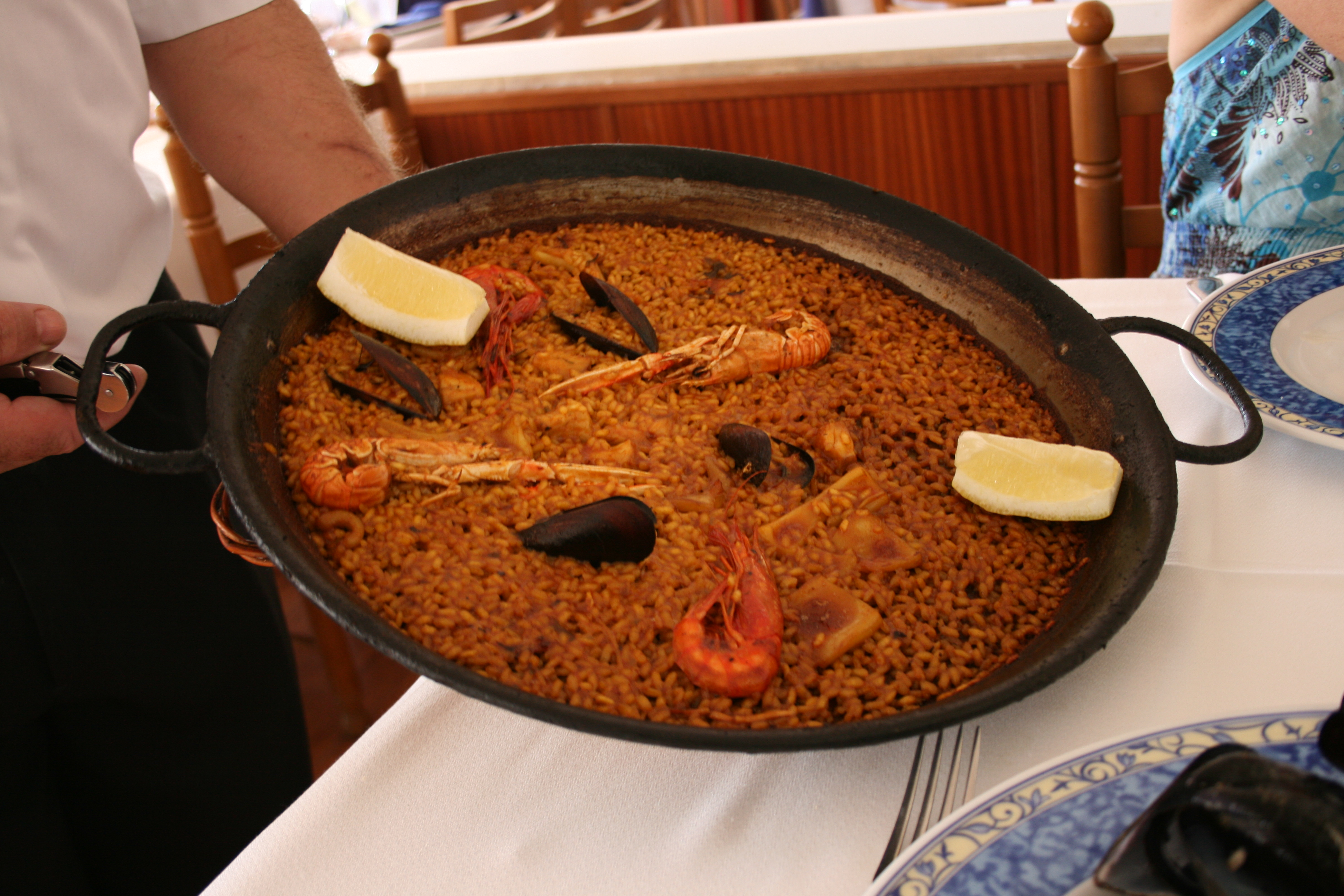 Paella de bajo fondo- socarrat